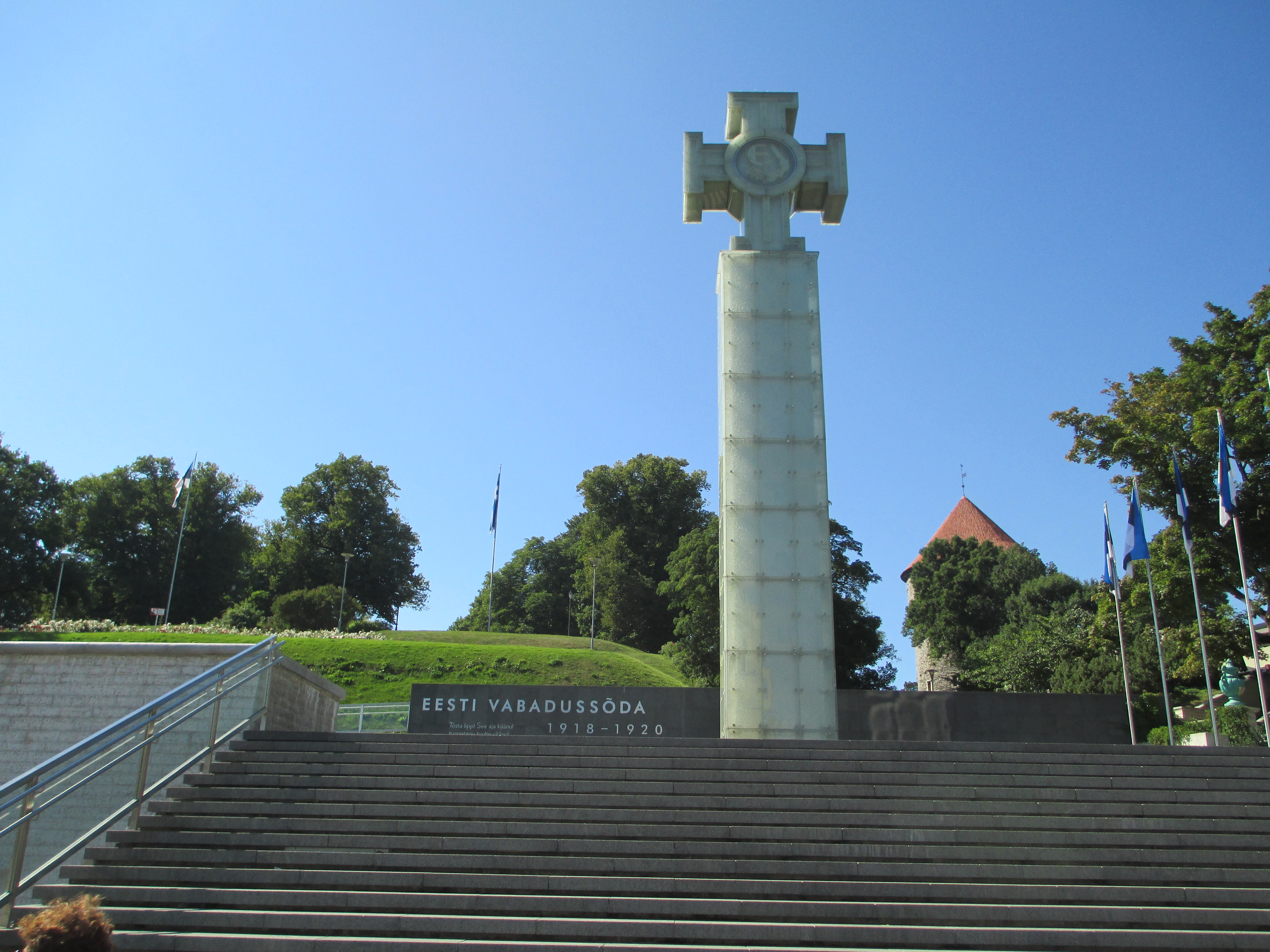 עמוד הניצחון של מלחמת העצמאות של אסטוניה (1918-1920) בטאלין